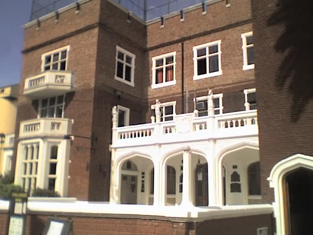 Sede Social del Club Ferro Carril Oeste